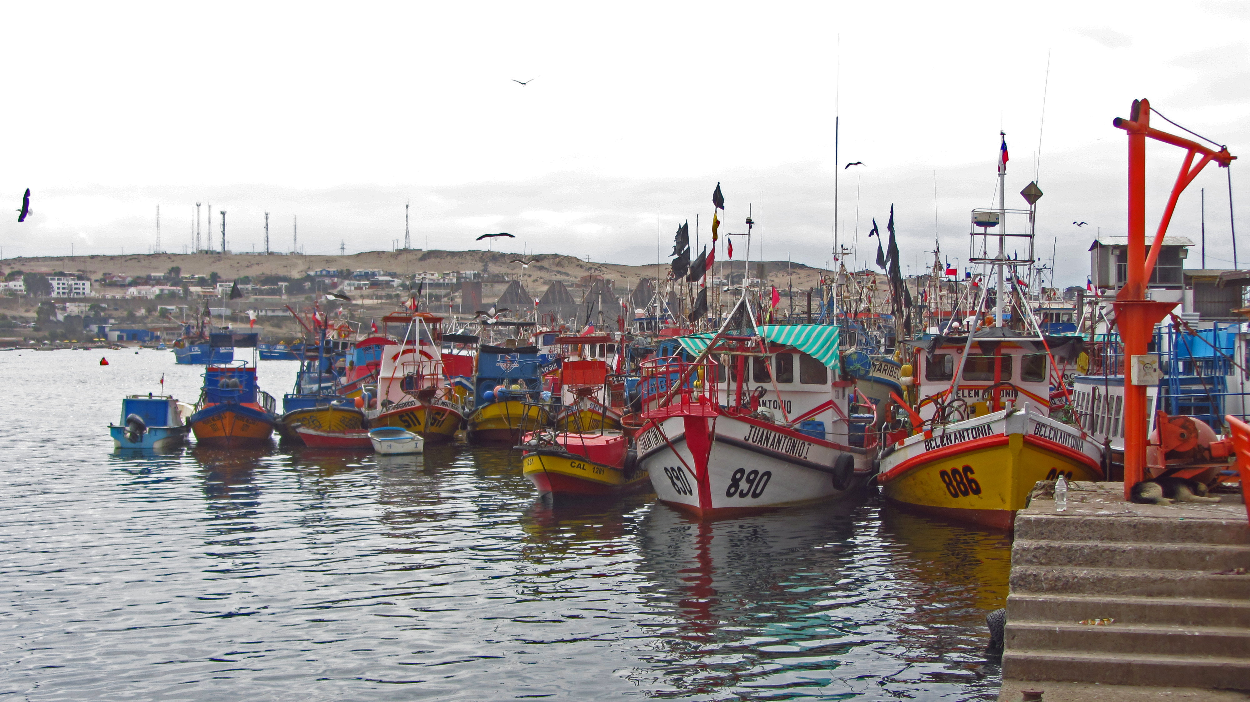 Caleta de Caldera Región de Atacama, Chile Febrero de 2016